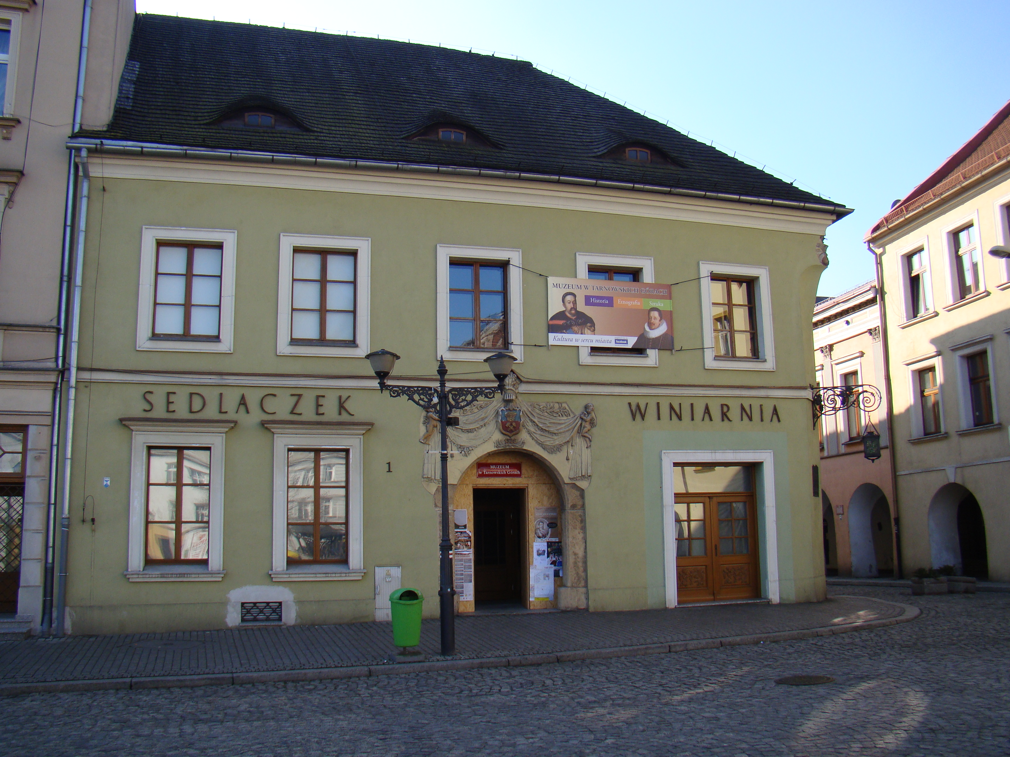 Tarnowskie Góry, Budynek "Sedlaczek", XVI, XVIII w.